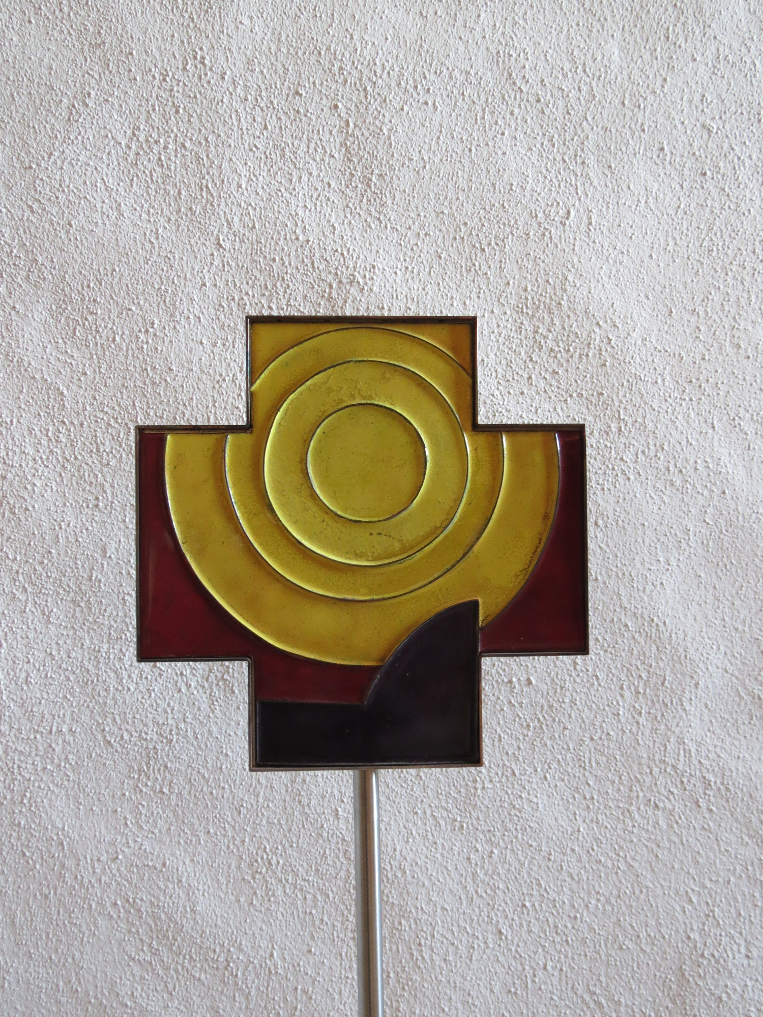 Römisch-katholische Pfarrkirche St. Georg Elgg, Kunstwerk von Christof Zünd